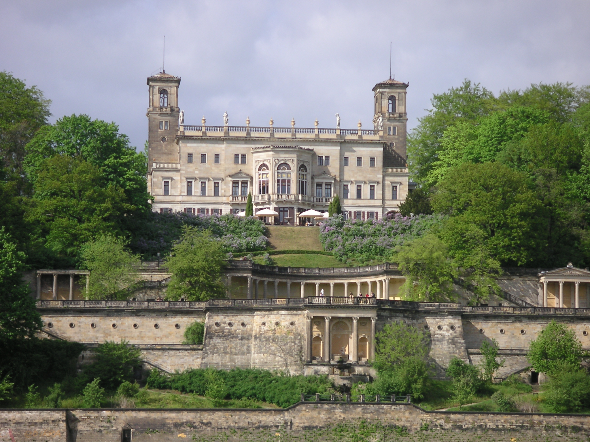 Dresden Schloss Albrechtsberg Elbseite mit Elbhang